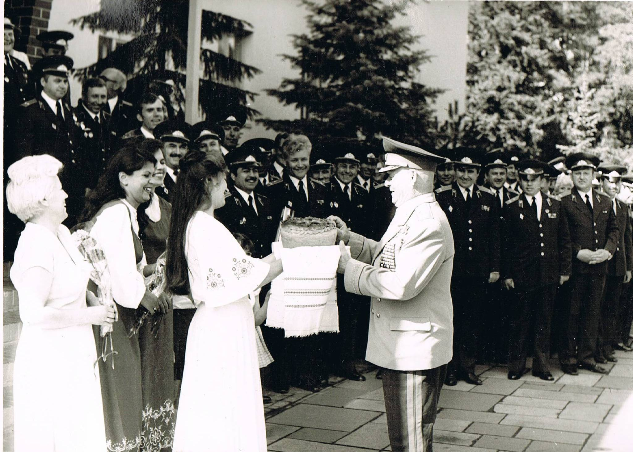 Лелюшенко Д. Д. встречают хлебом и солью в родной гвардейской армии. Эберсвальде 1984.